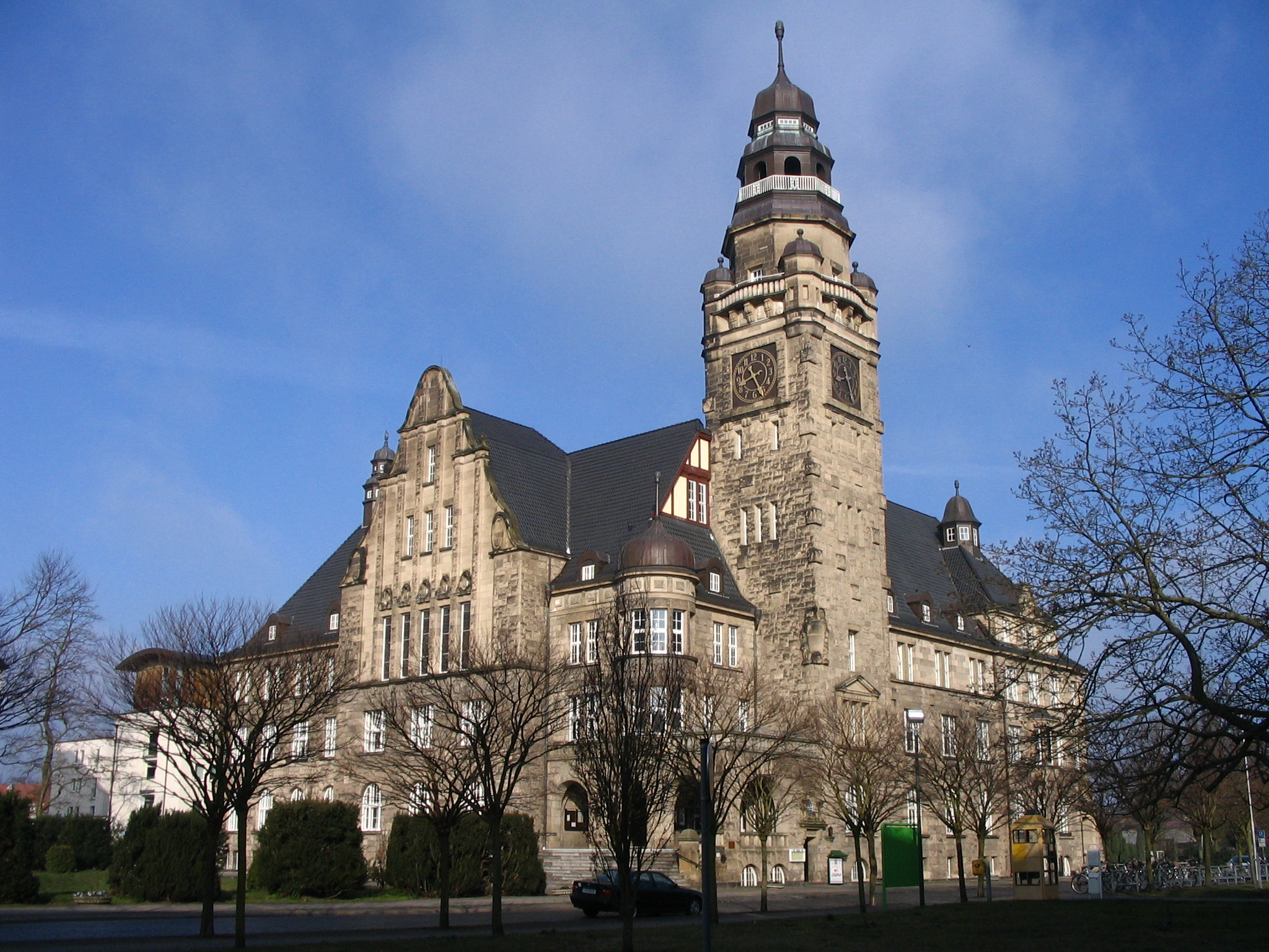 Rathaus von Wittenberge 2008